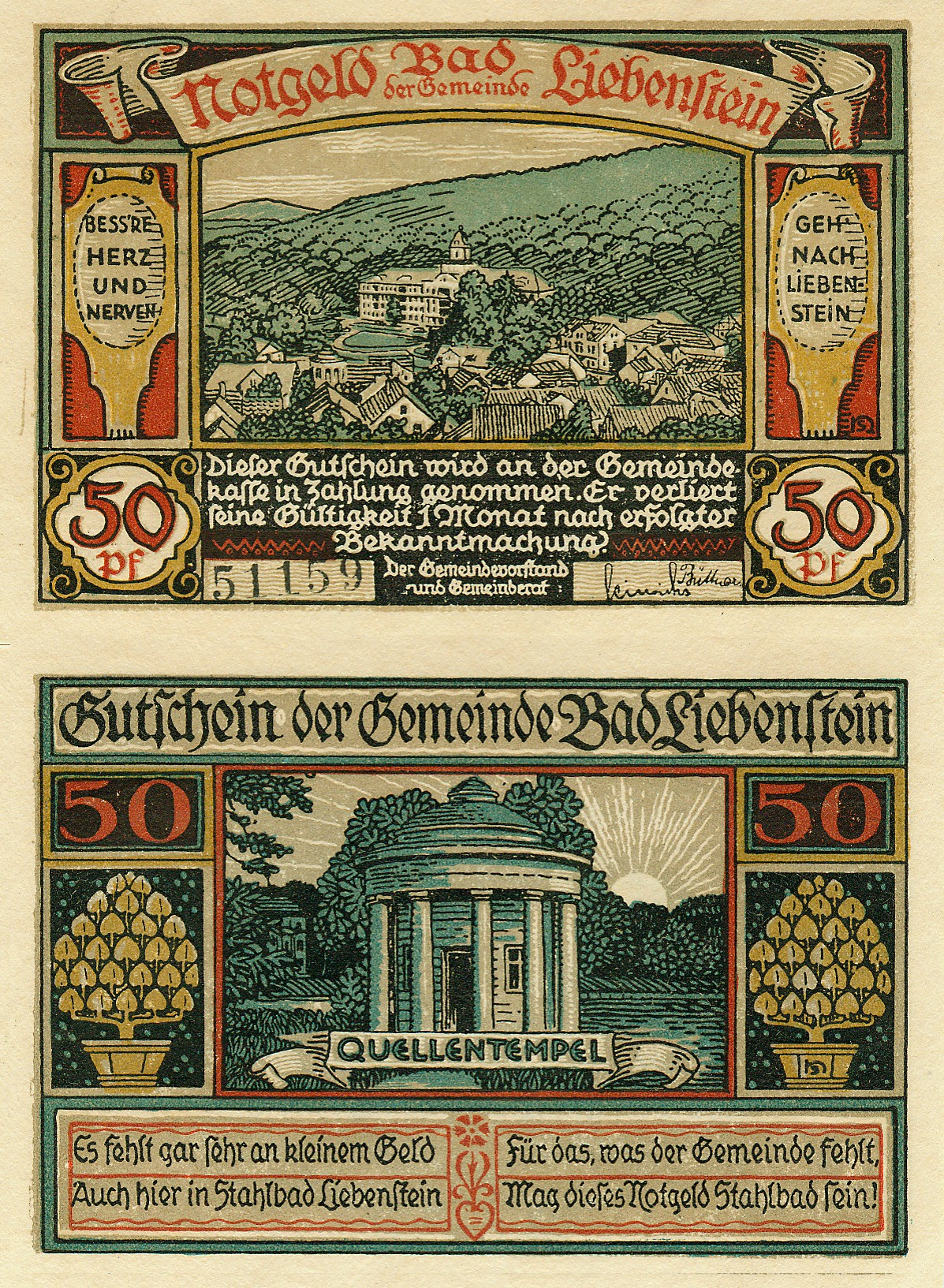 Notgeld der Gemeinde Bad Liebenstein von 1921